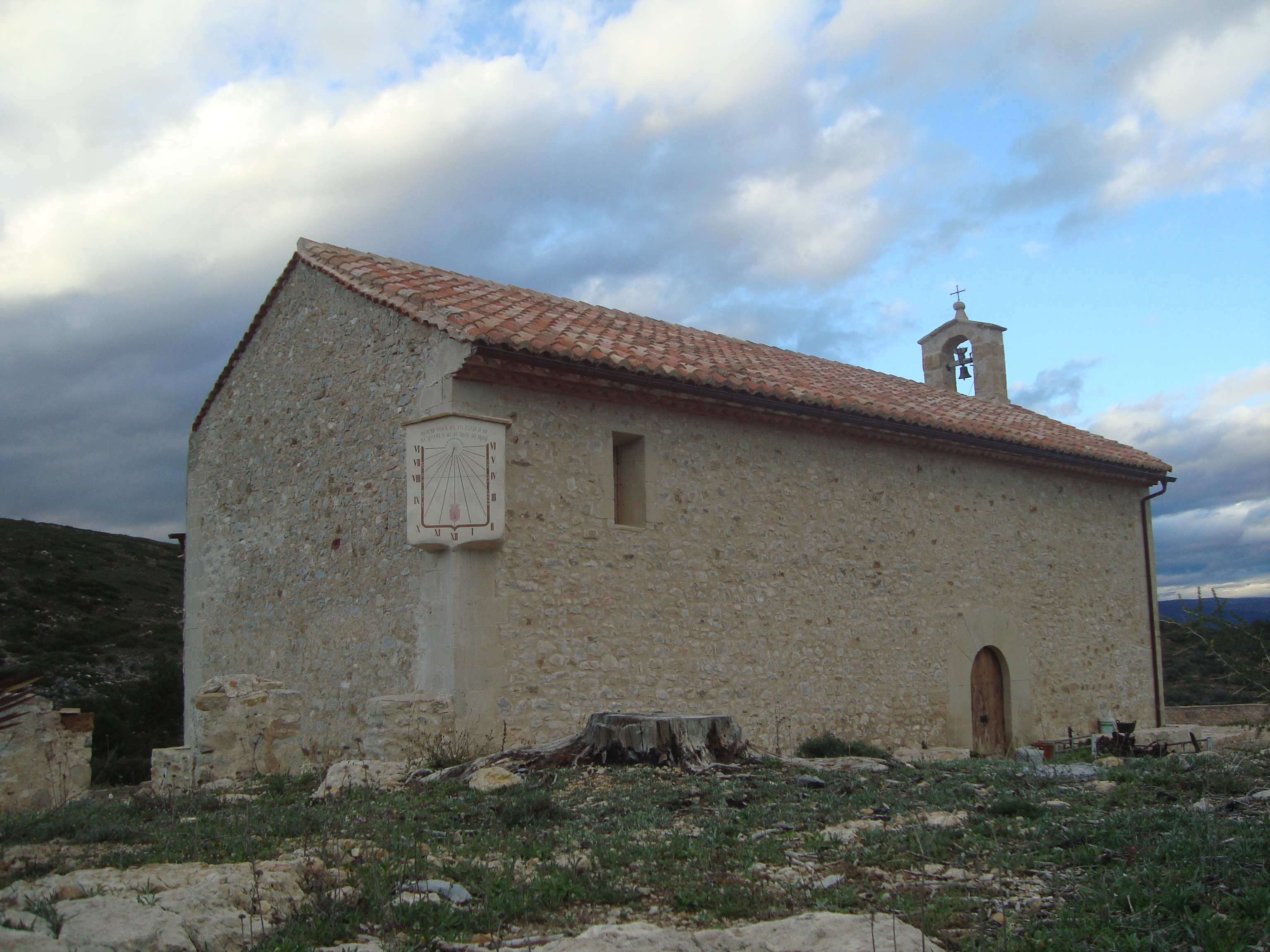 Ermita del Castell d'Atzeneta del Maestrat, dedicada a la Virgen de la Esperanza y a los Santos Fabián y San Sebastián.